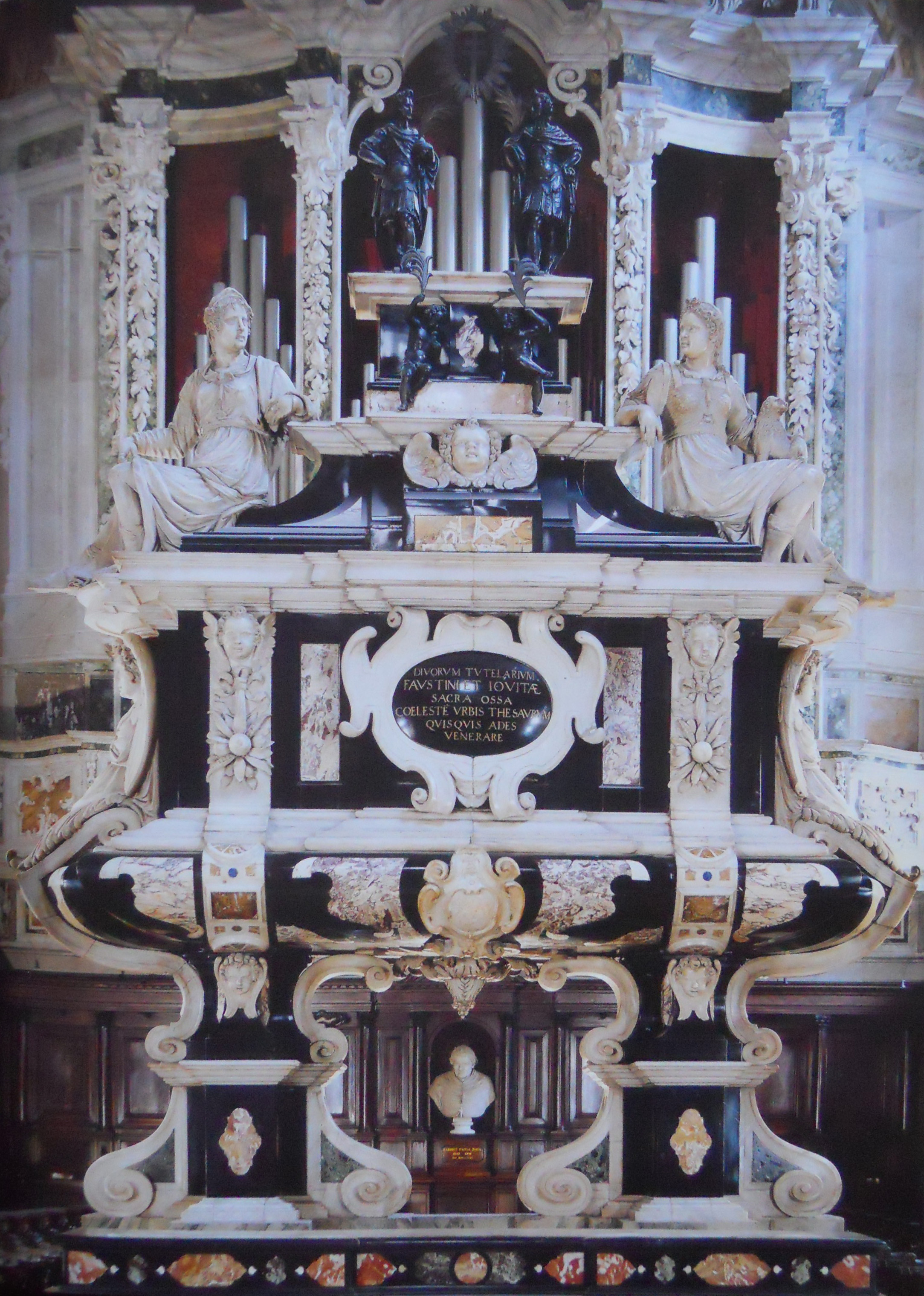 Arca sepolcrale dei Santi Faustino e Giovita